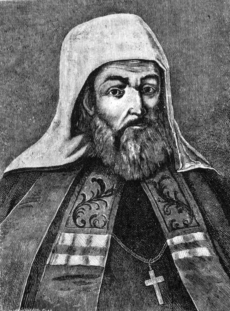 Митрополит Гедео́н (в миру князь Г.З.Святополк-Четвертинский (?-1690) — православный митрополит Киевский, Галицкий и Малыя Руси. Портрет XVII века